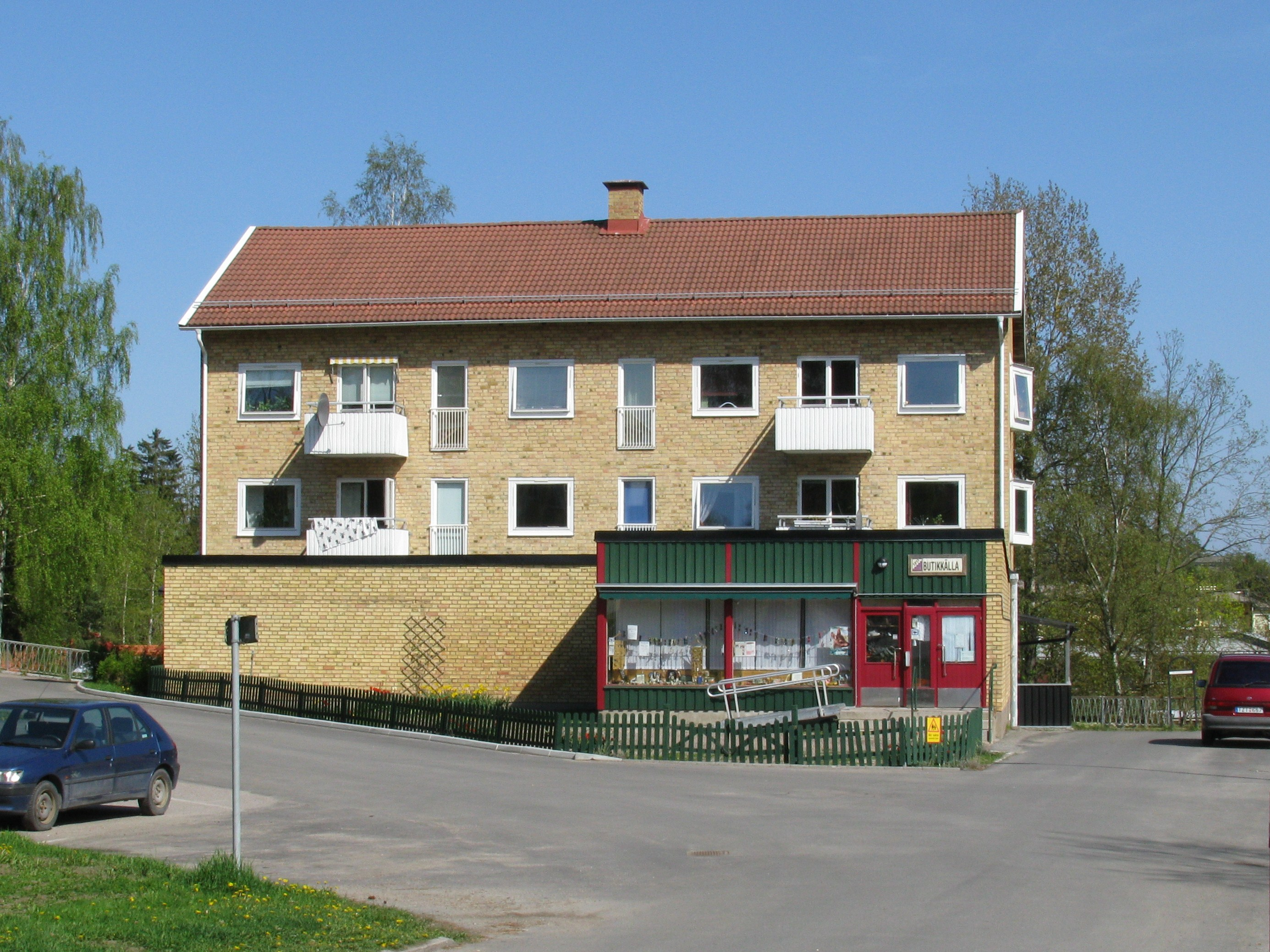 Bostadhus och f.d. Konsumbutiken i Hästhagen i Gustavsberg på Värmdö.